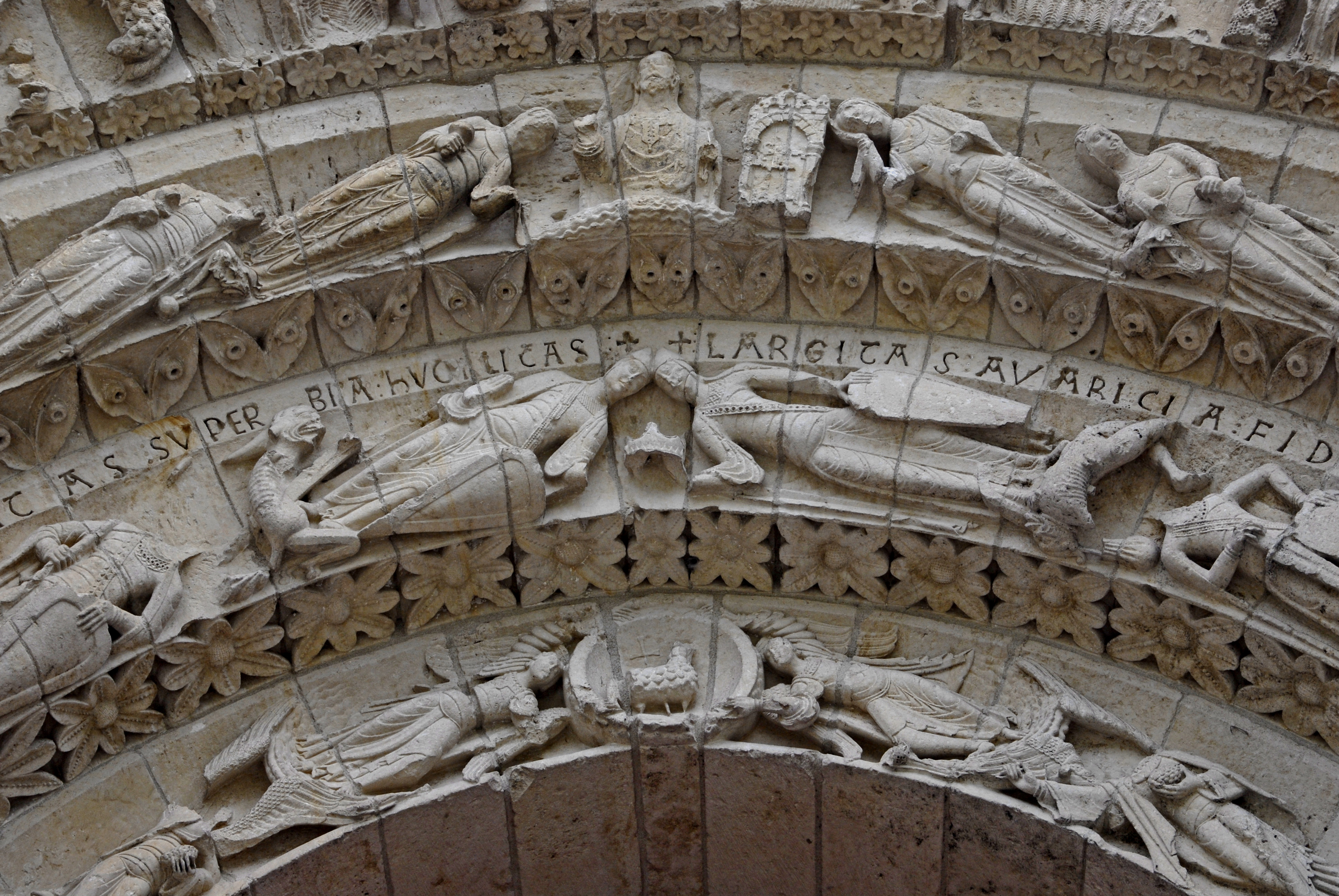 St.-Pierre Aulnay, Hauptportalbögen 2-4, Scheitel